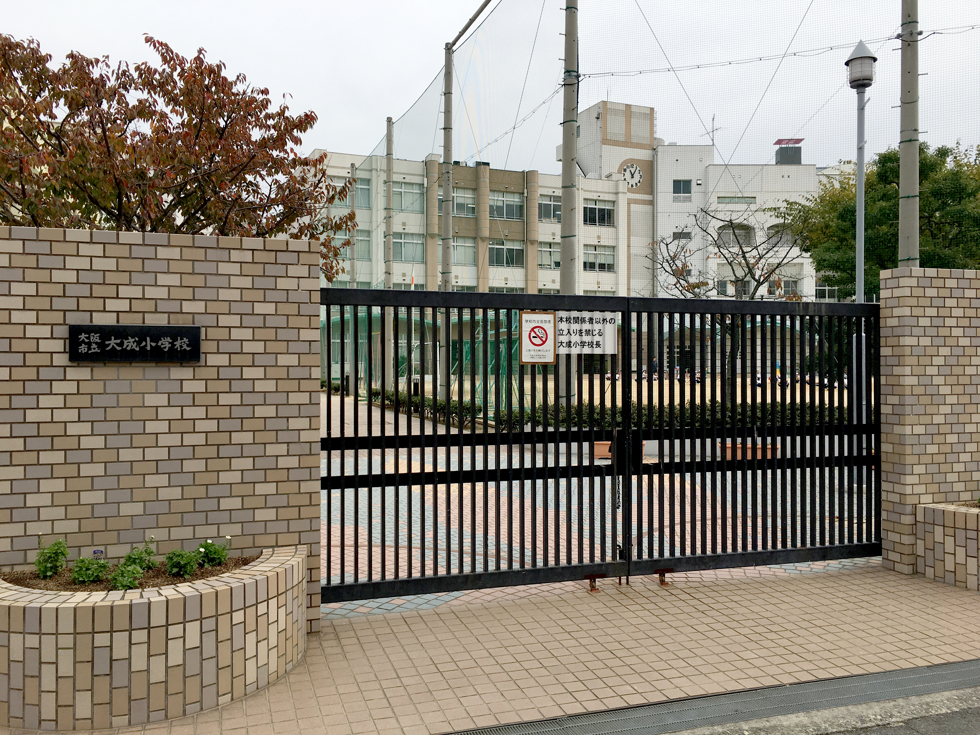 大阪市立大成小学校